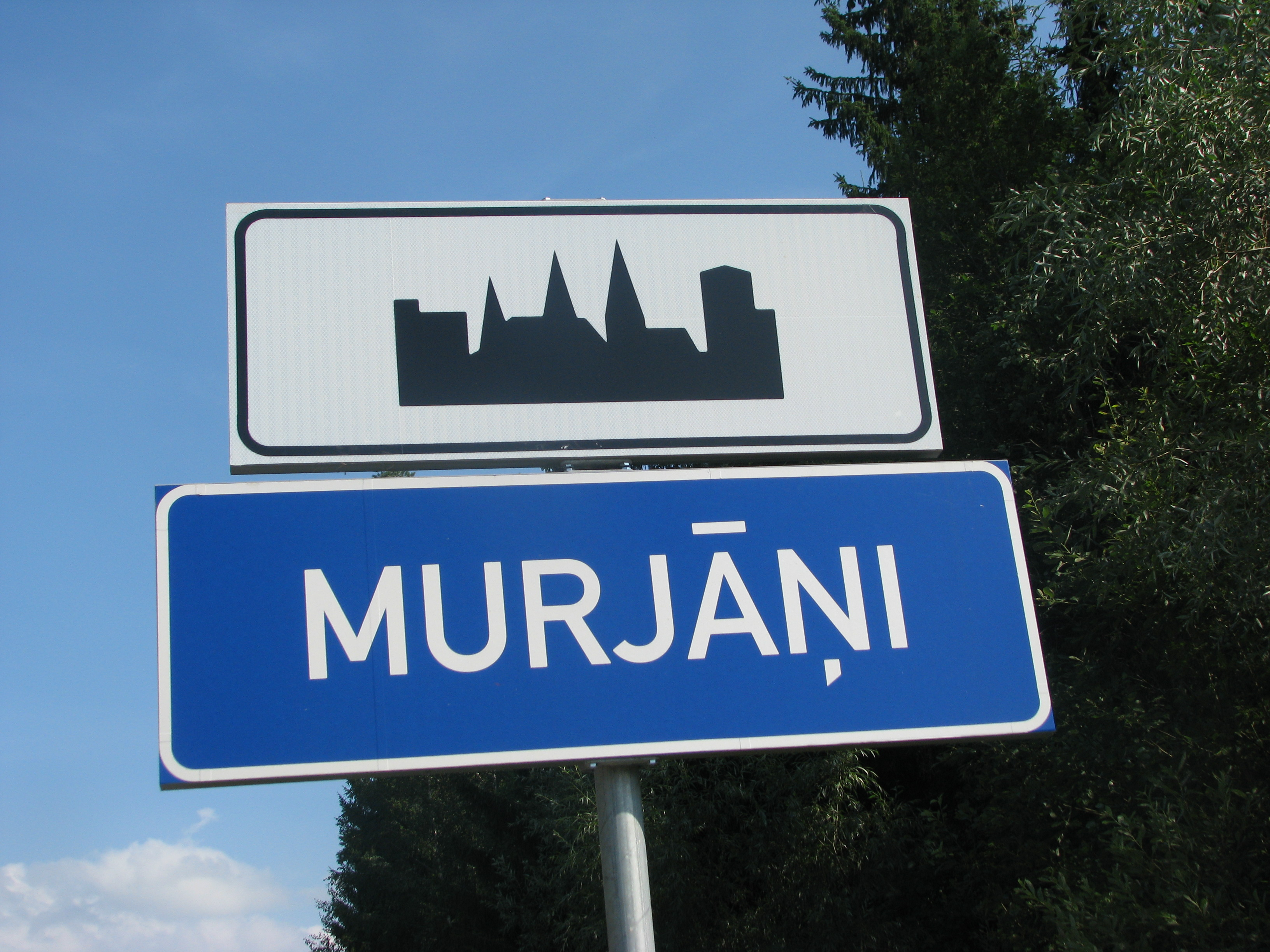 Ceļa zīme